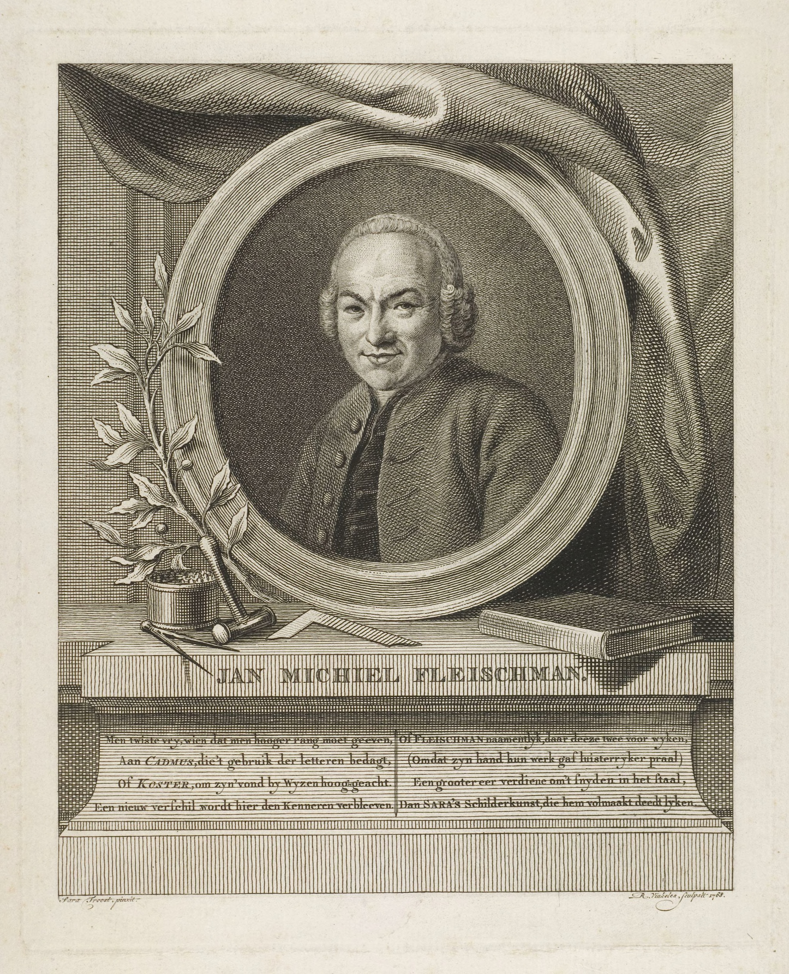 Kupferstich - Portrait des Johann Michael Fleischmann